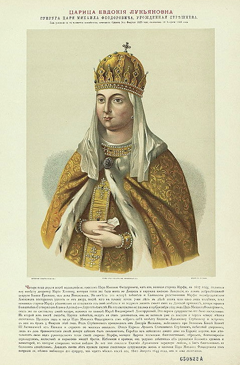 Борель Петр Федорович (1829-1898), живописец, график, литограф. Евдокия Лукьяновна. 1852-1860, Литография, акварель; 26,2х20,5; 51,2х34 см